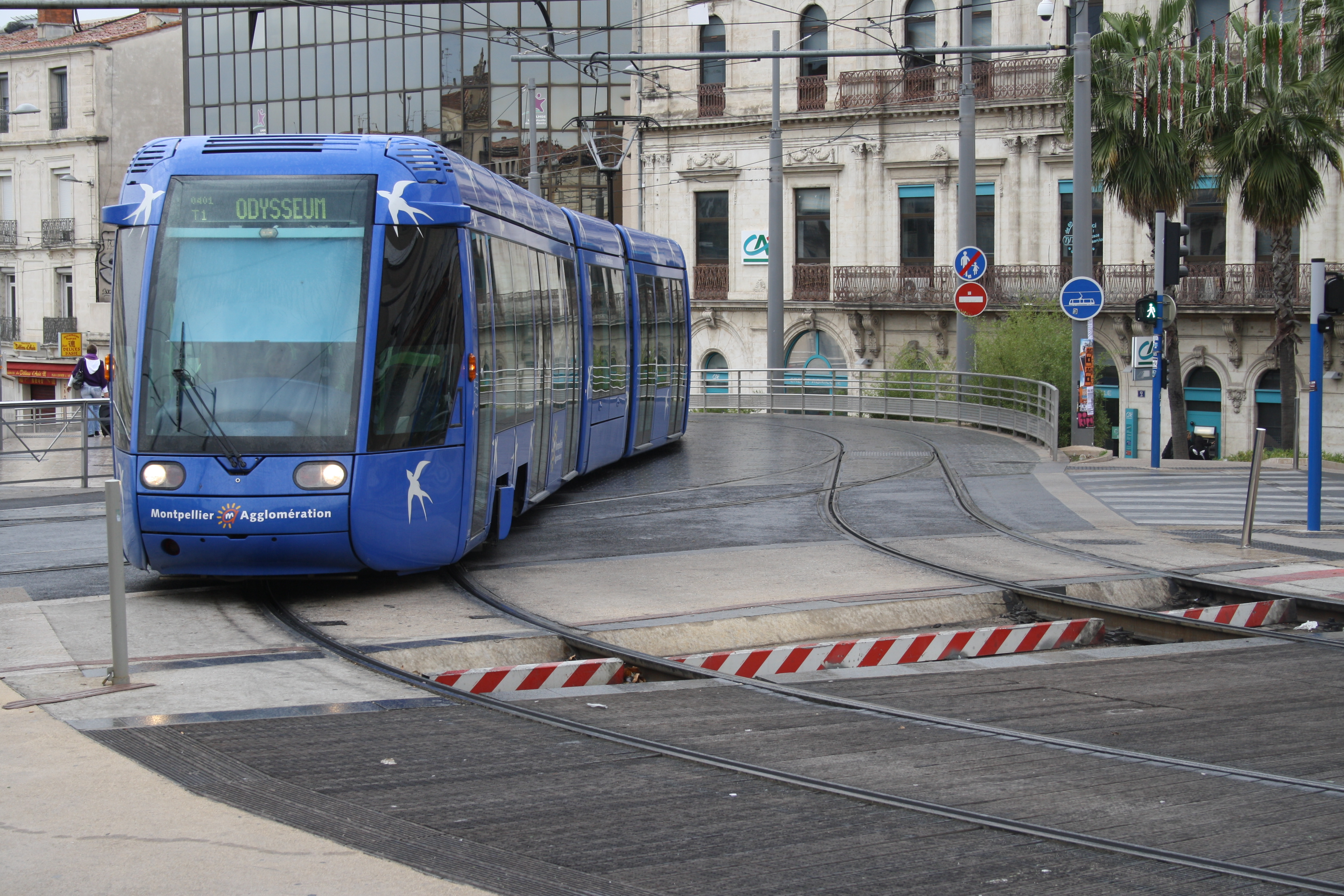 Montpellier Linie 1 Einfahrt auf die Bahnüberbauung